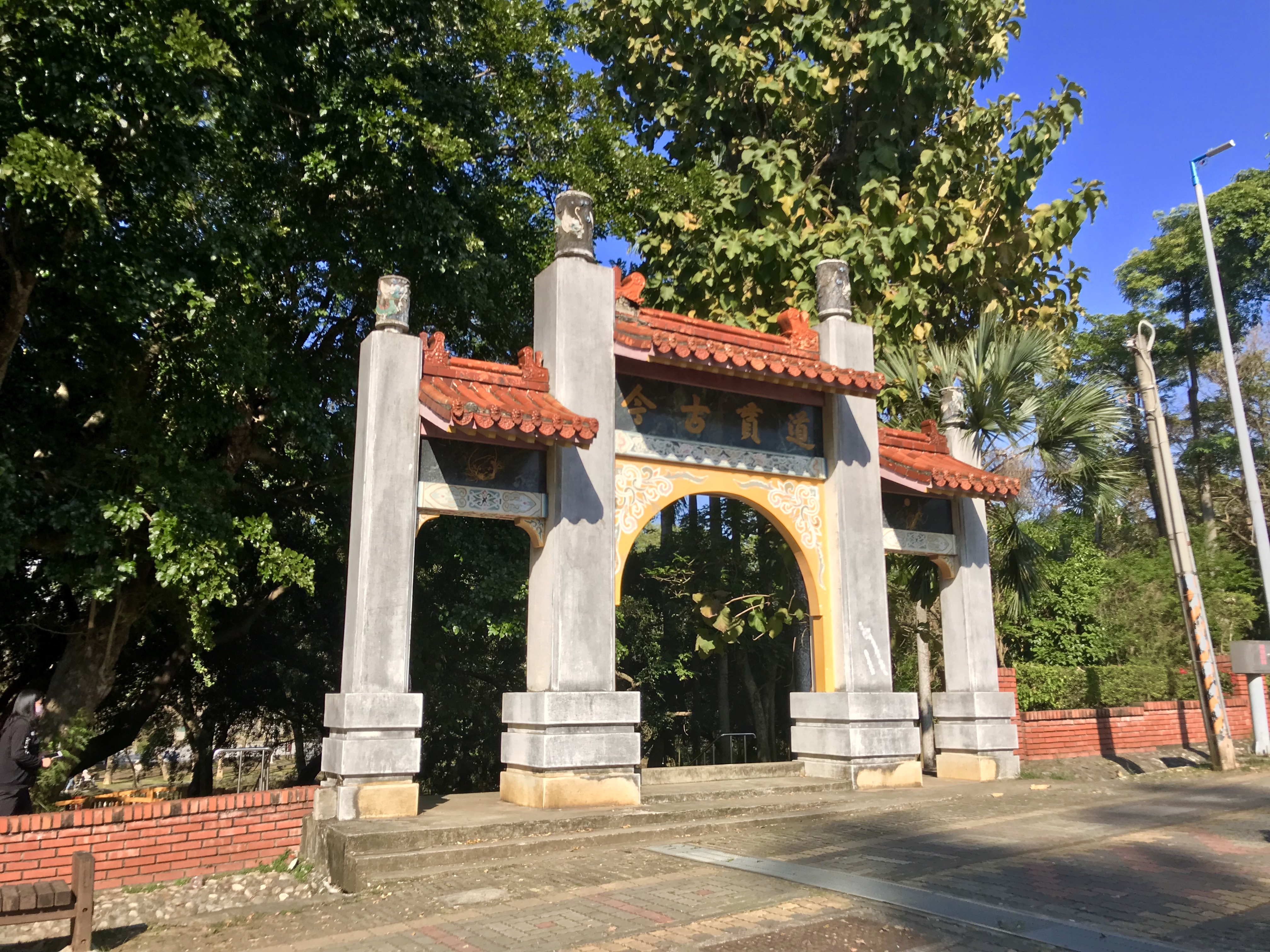 中文（台灣）: 嘉義孔子廟道貫古今坊